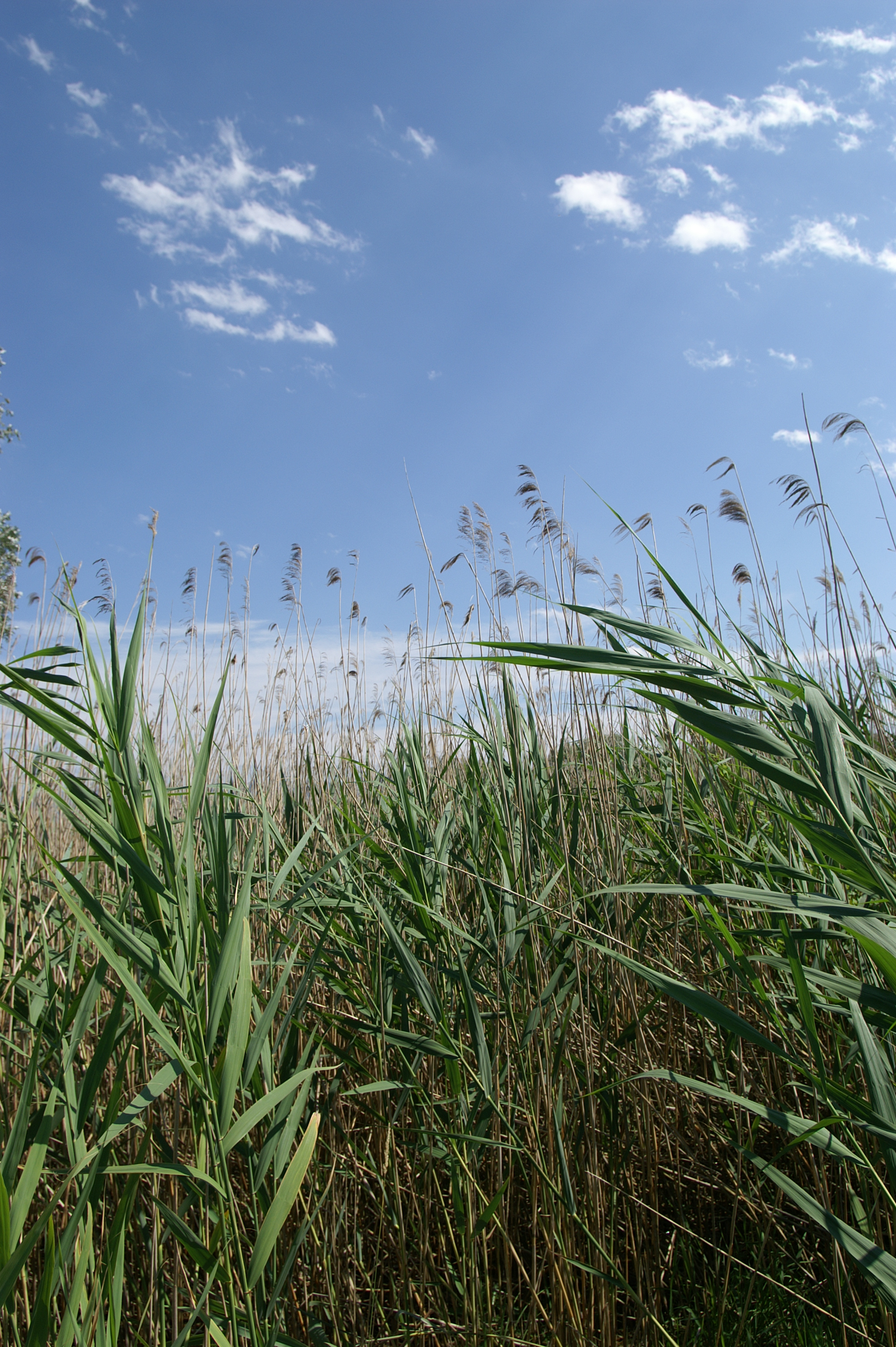 Schilfrohr - (Röricht) am Bodenseeufer in Fussach in Vorarlberg.